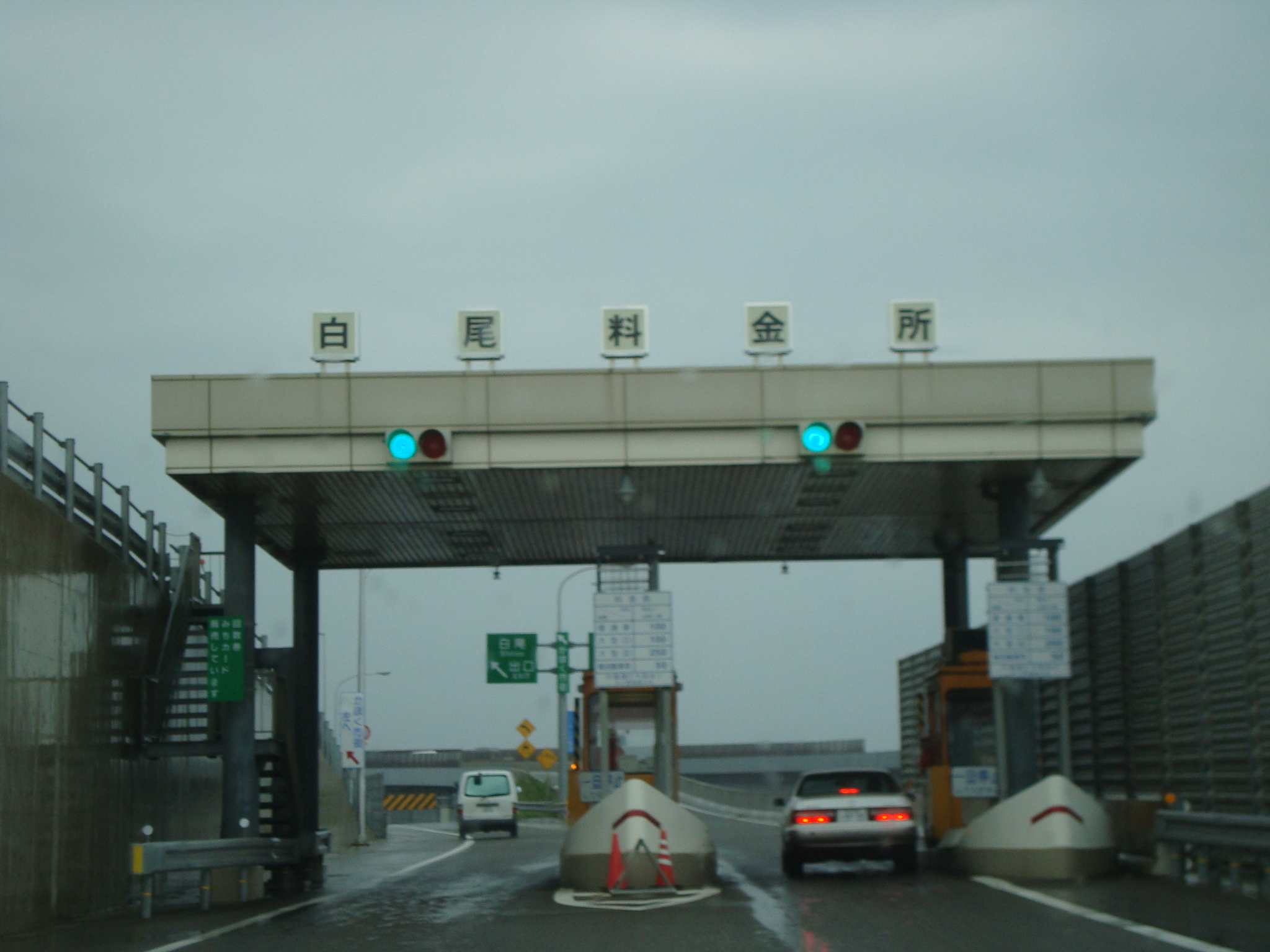 能登有料道路 白尾料金所